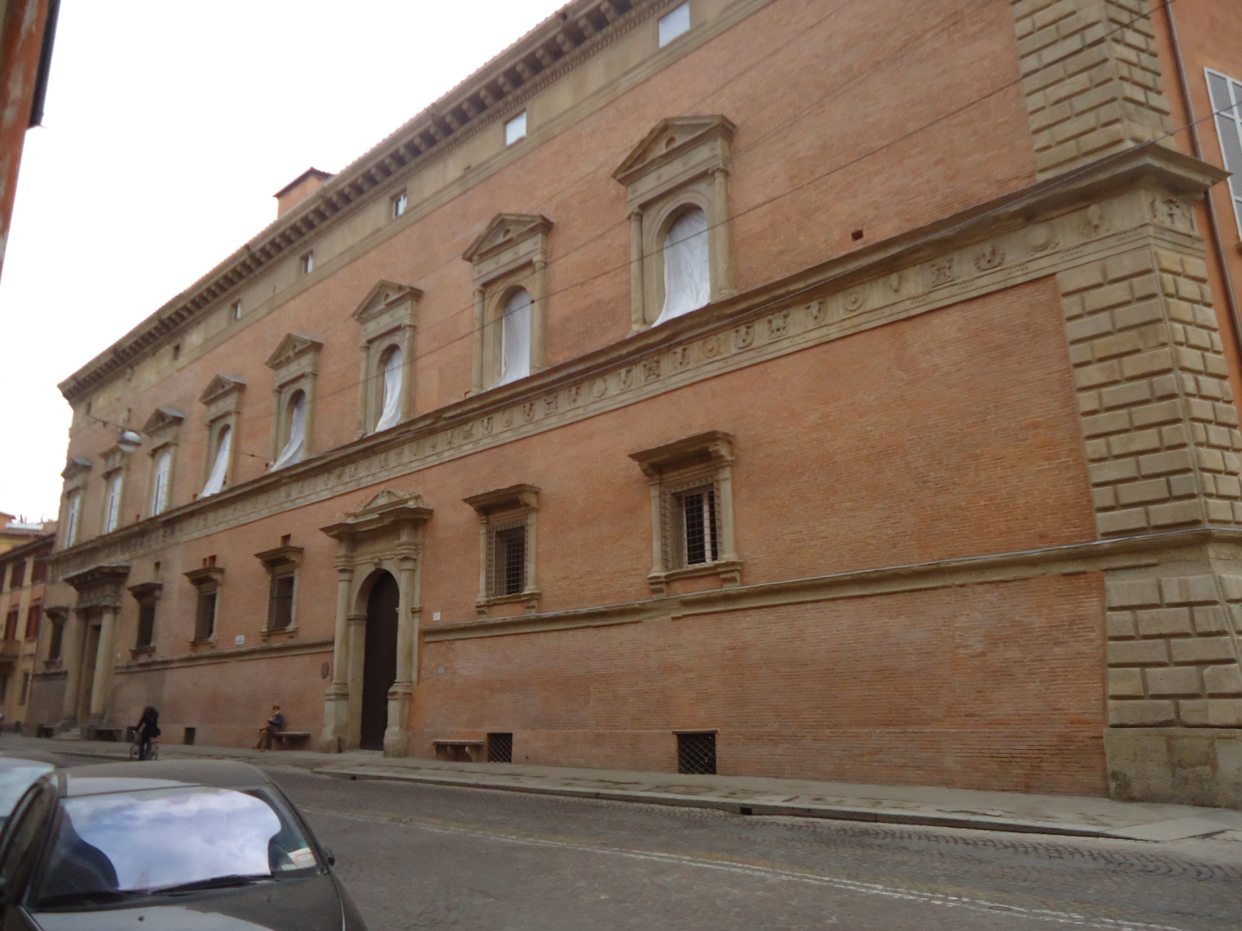 Vista del prospetto del palazzo Albergati in via Saragozza 26, Bologna, Italia